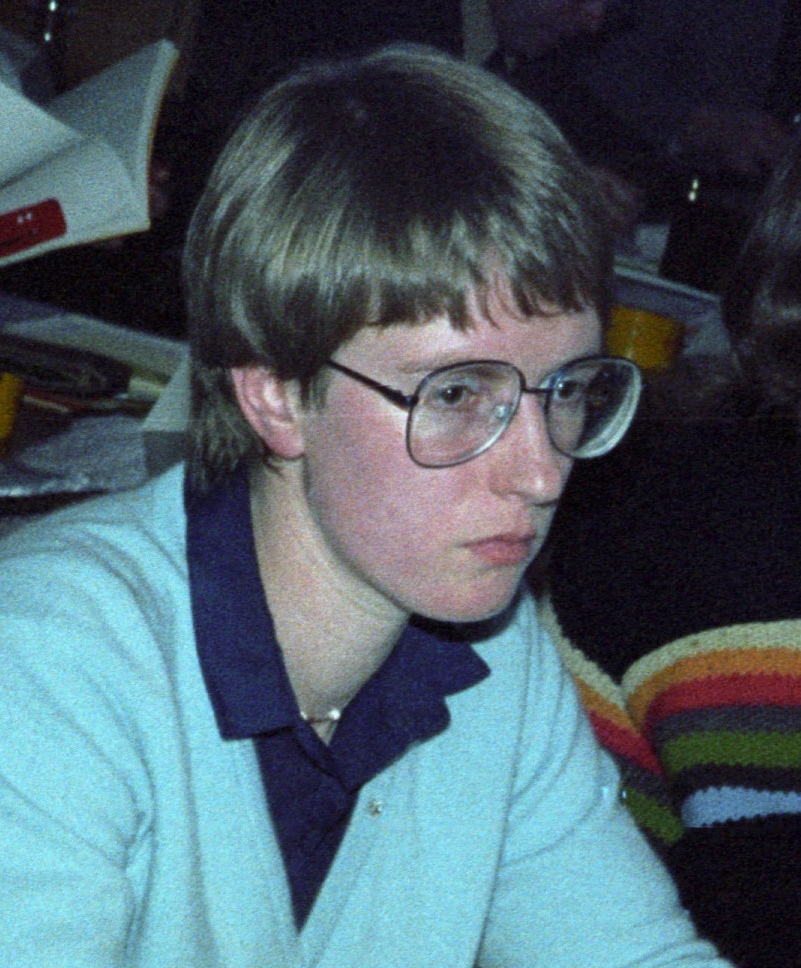 Porträt der Hamburger Bürgerschaftsabgeordneten Helga Weise